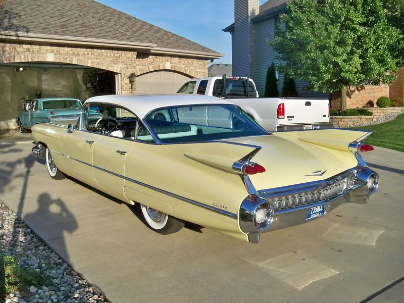 Six Window